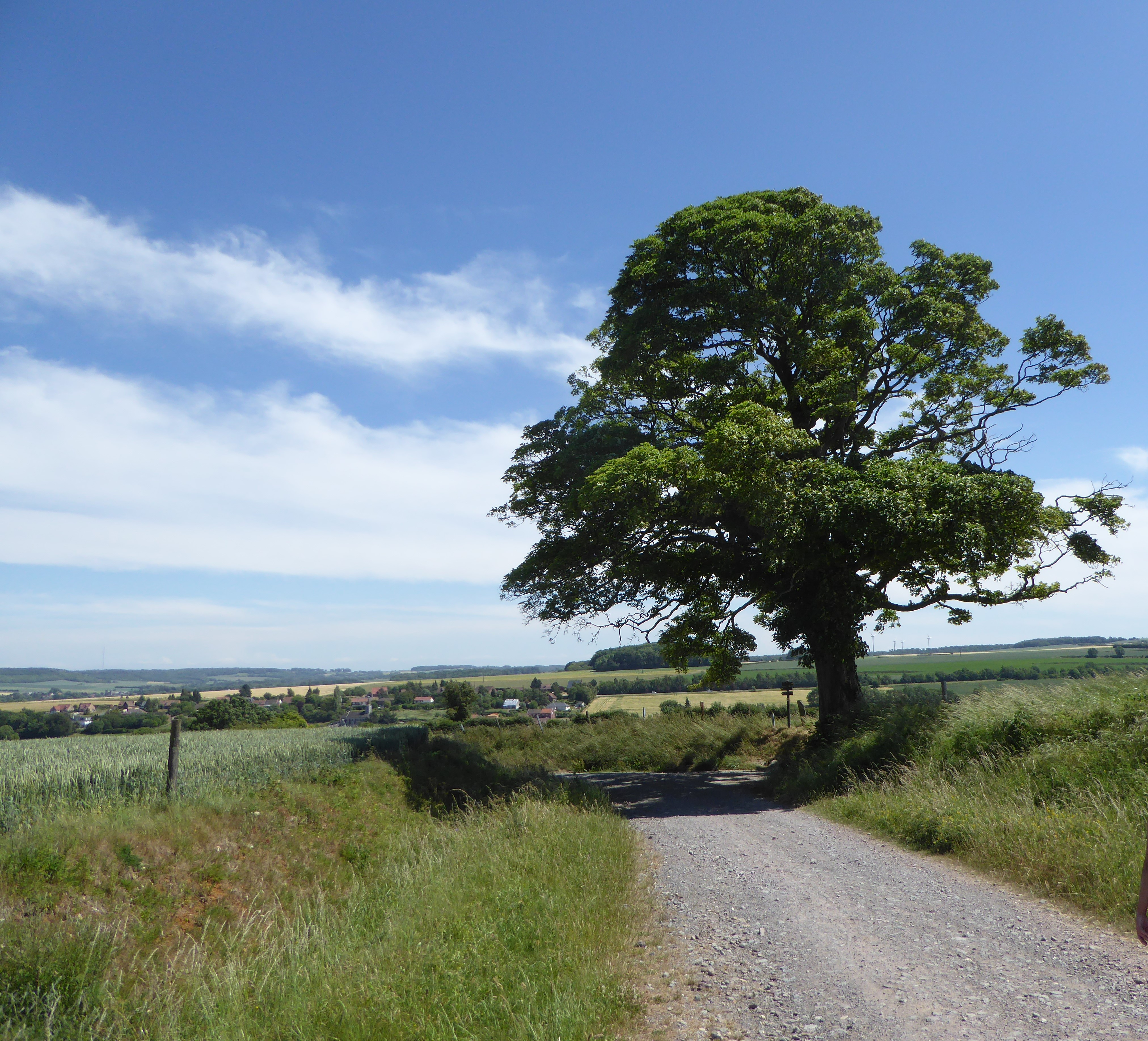 L’Arbre Rond, érable champêtre de Beugin (Pas-de-Calais, France) .